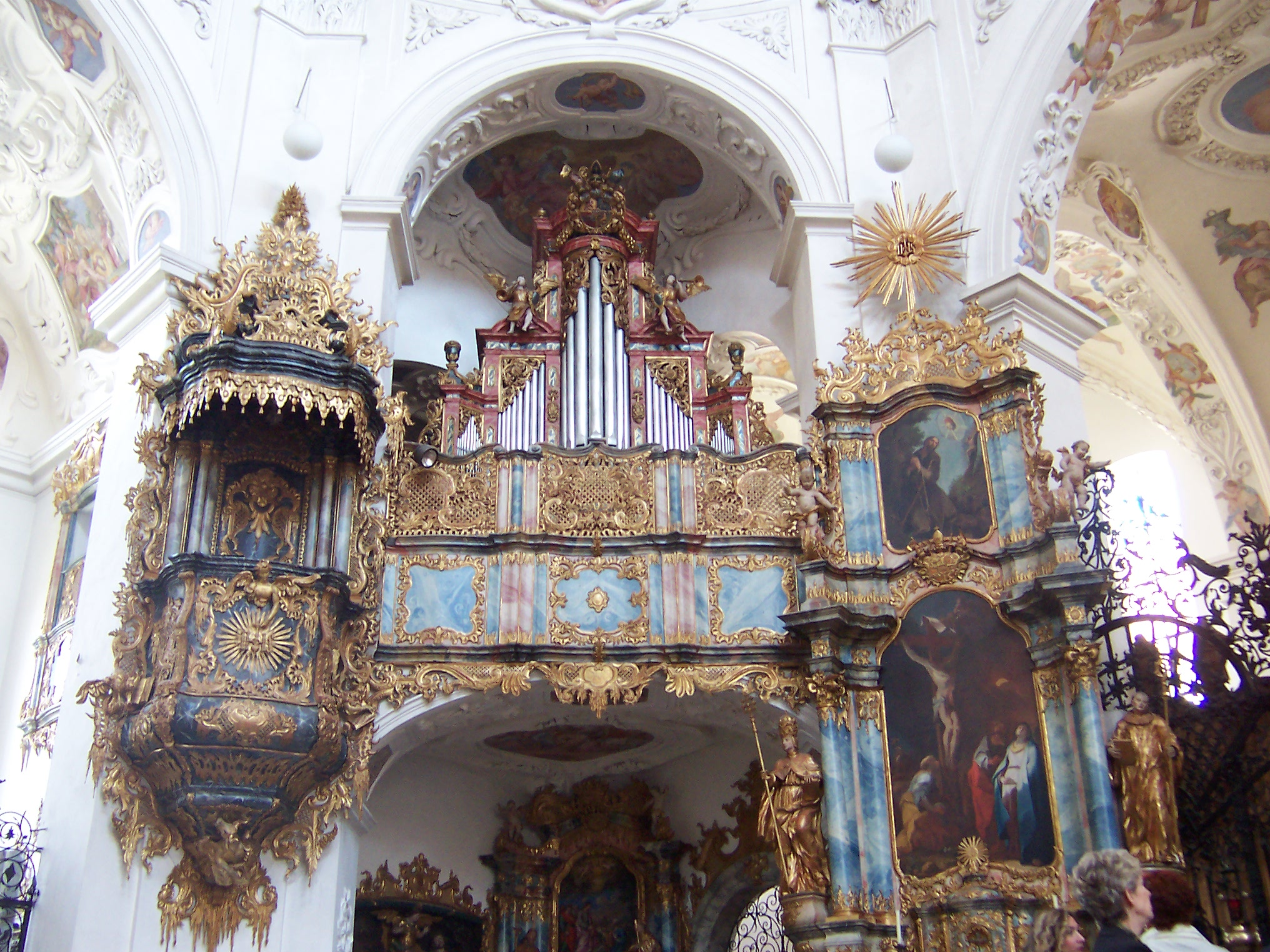 Empore mit Evangelienorgel der Klosterkirche in Muri, Kanton Aaargau, Schweiz.